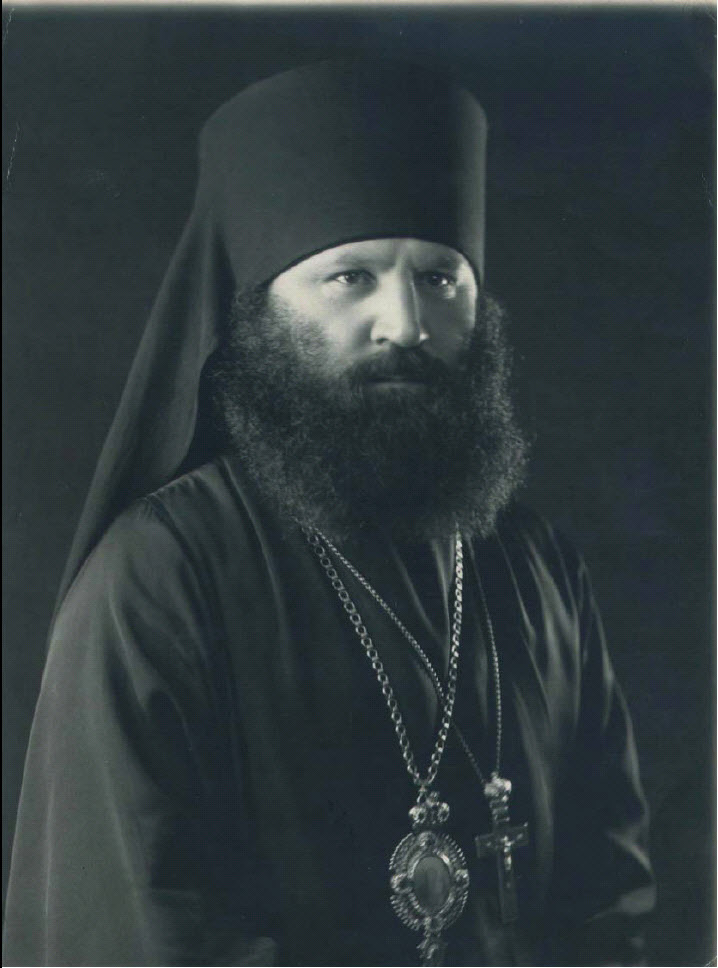 Епископ Виктор (Святин) после хиротонии в 1932 году